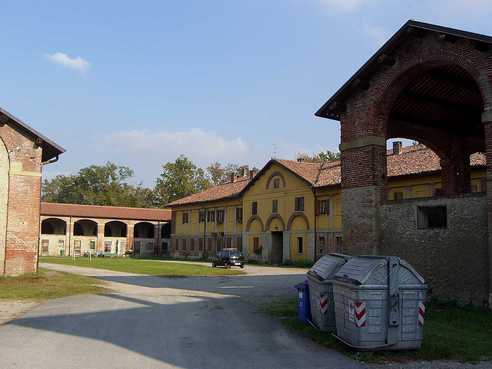 Monza - Parco della Villa Reale Cascina Casalta - cortile interno